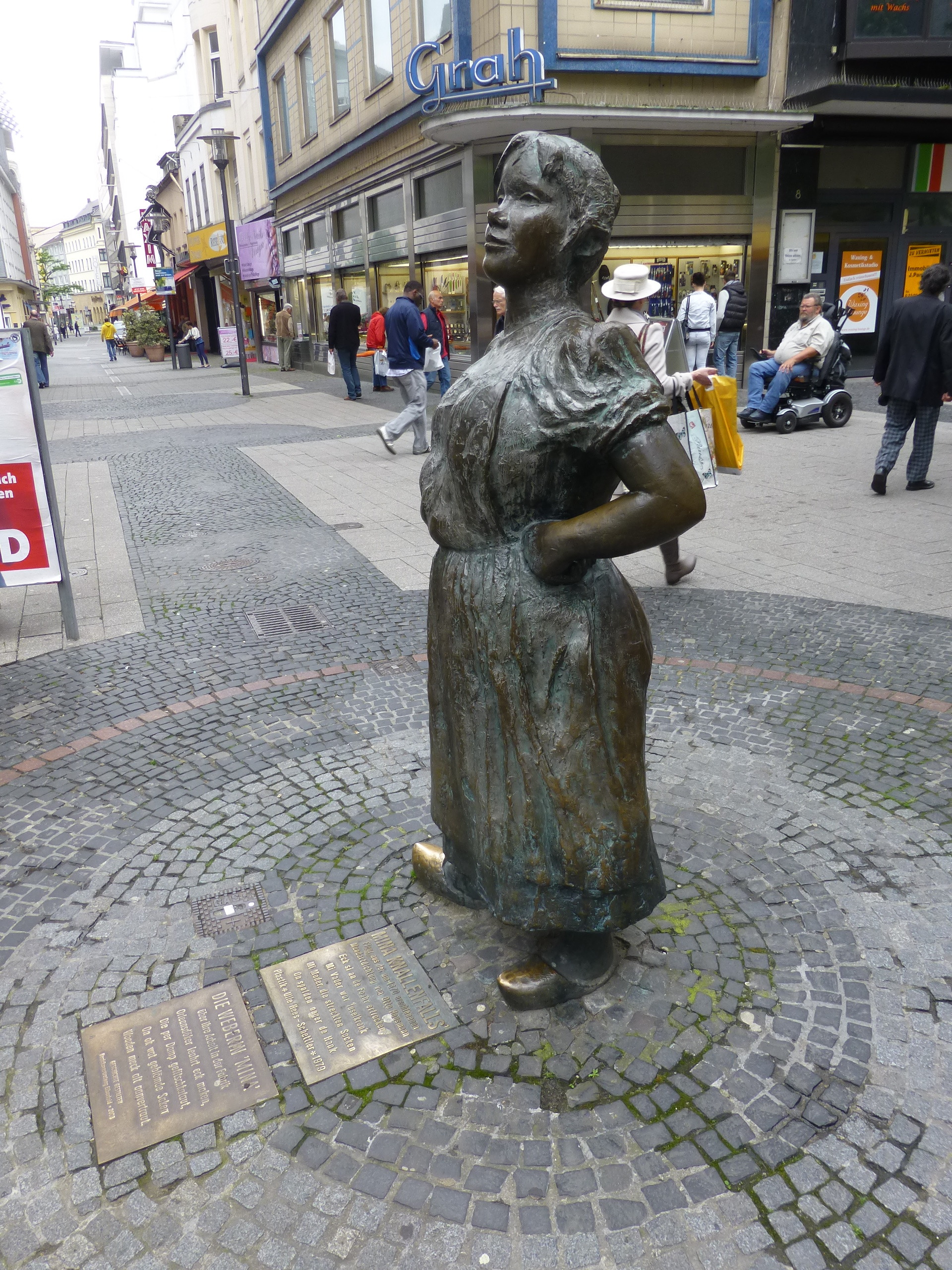 Alte Freiheit, Wuppertal